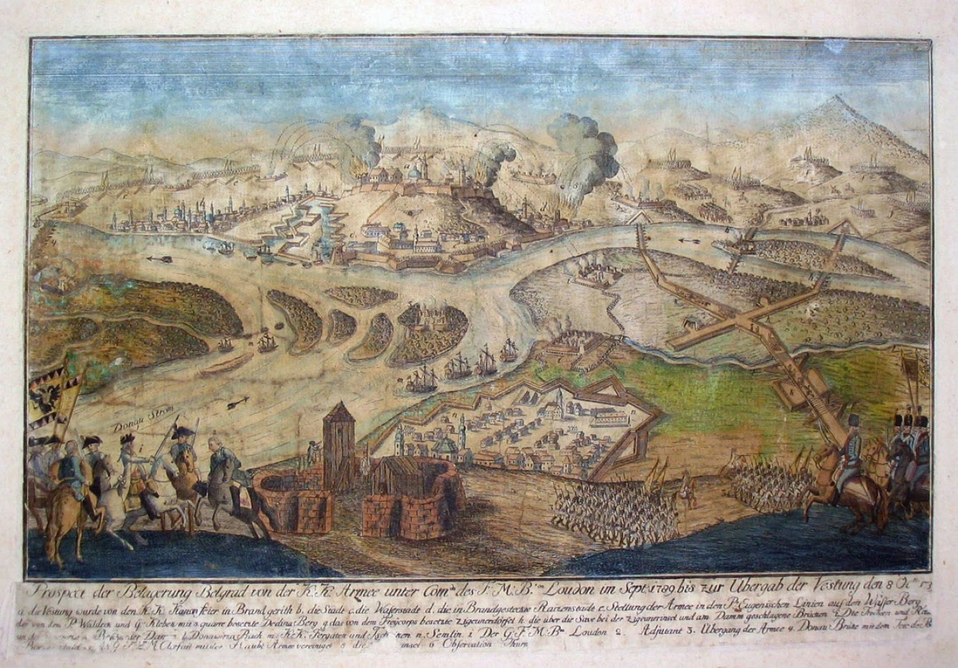 Belagerung Belgrads durch die k. k. Armee unter Feldmarschall Loudon, 1789.